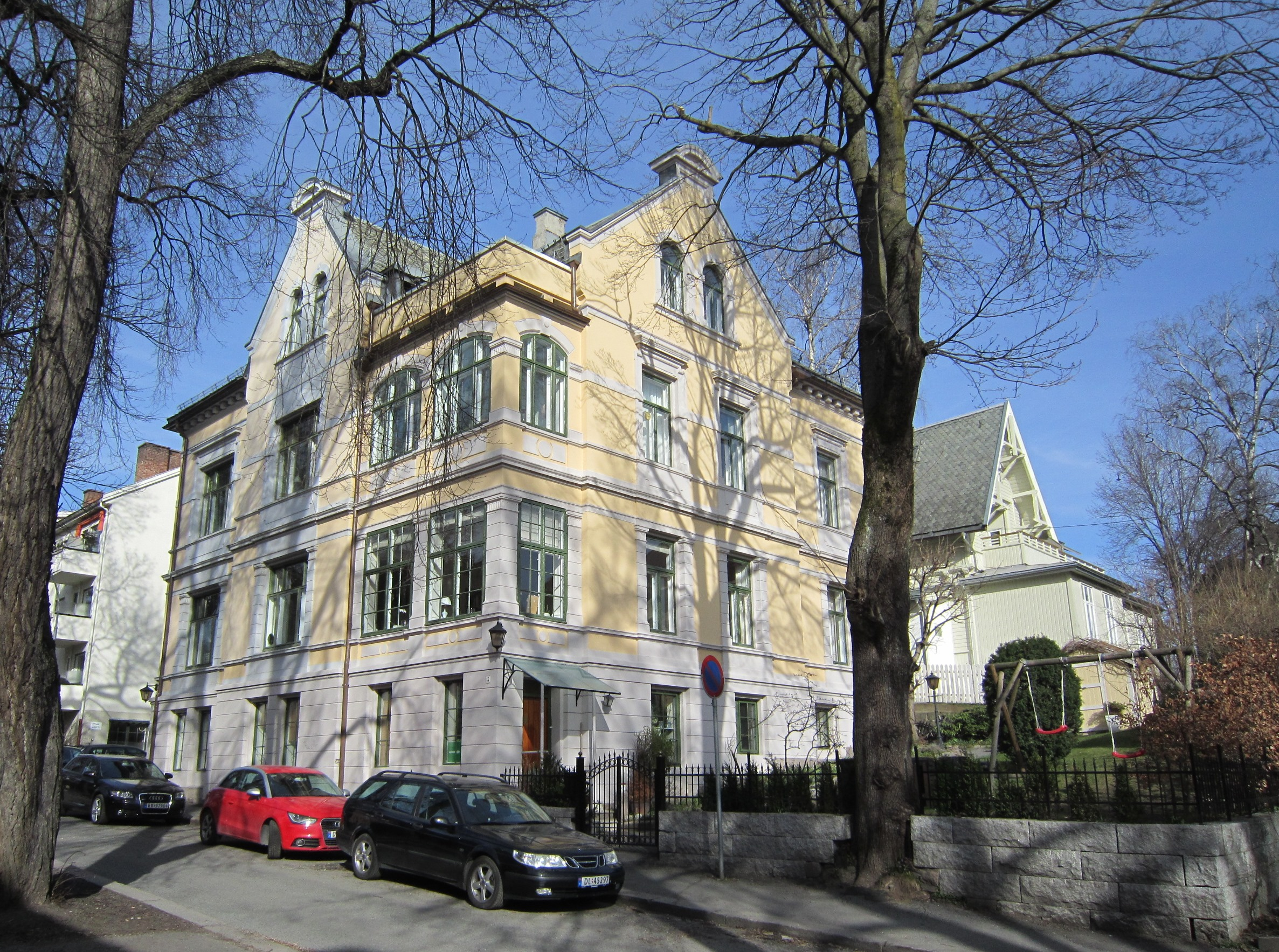 Lille Frogner allé 3. Byggemeldt 1893. Arkitekt: Johan Storm Munch. Hadde tidligere adresse Frognerveien 25.